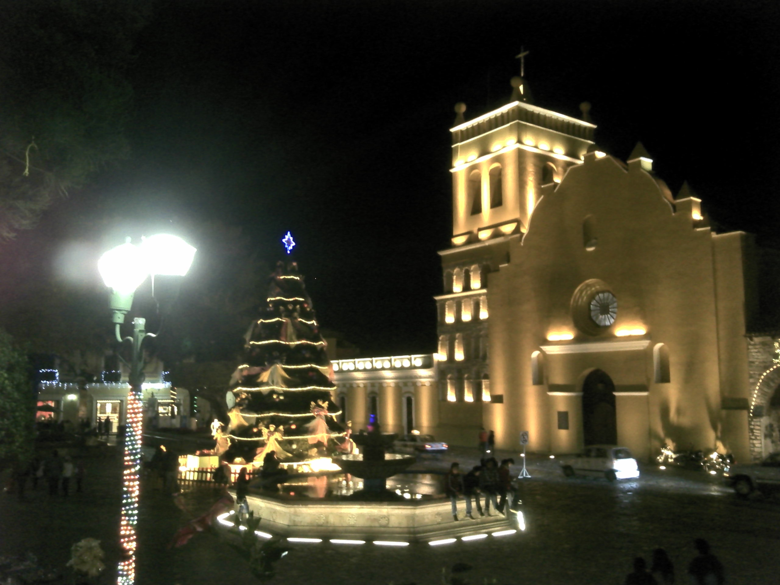 Catedral a Santo Domingo de Guzman, patrono de la ciudad